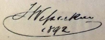 Unterschrift Weßickens auf einem Einreichplan von 1892 (Dreifaltigkeitsg. 20, Salzburg)